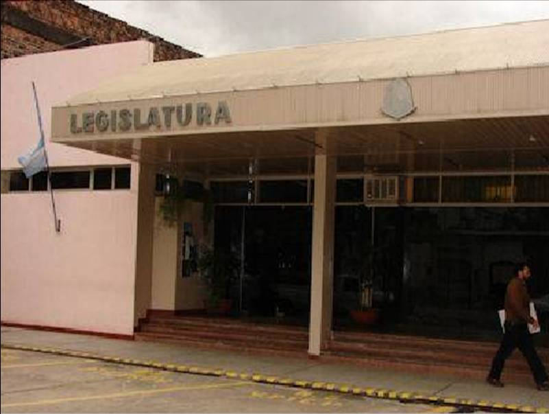 Honorable Legislatura de la Provincia de Formosa (Argentina)